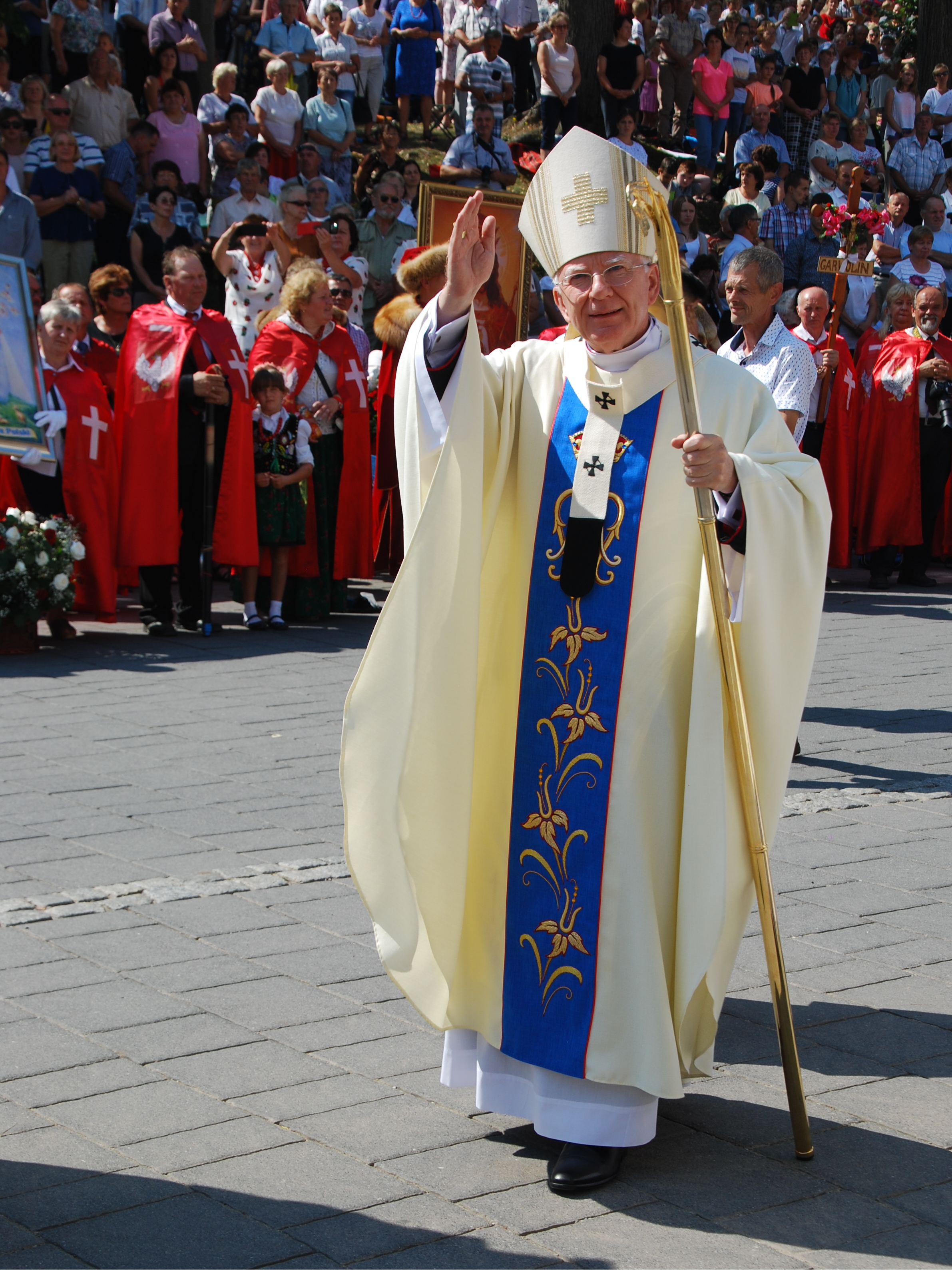 Metropolita Krakowski Abp Marek Jędraszewski w Kalwarii Zebrzydowskiej w czasie odpustu Wniebowzięcia NMP w 2018 r.